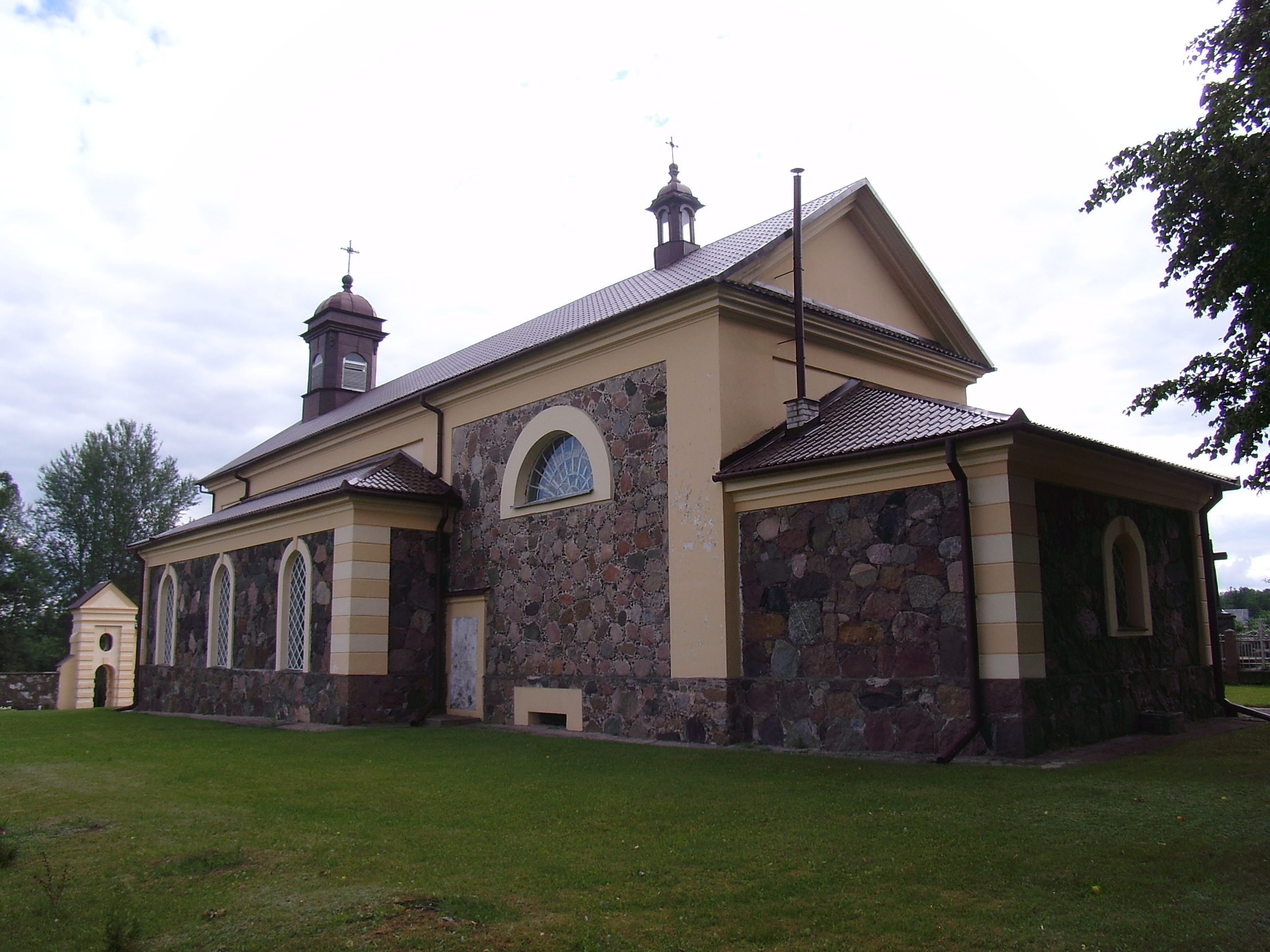 Беларуская (тарашкевіца): Касьцёл Маці Божай. в. Канстанцінава This is a photo of Belarusian heritage monument. Reference number: 613Г000654 ( WLM)